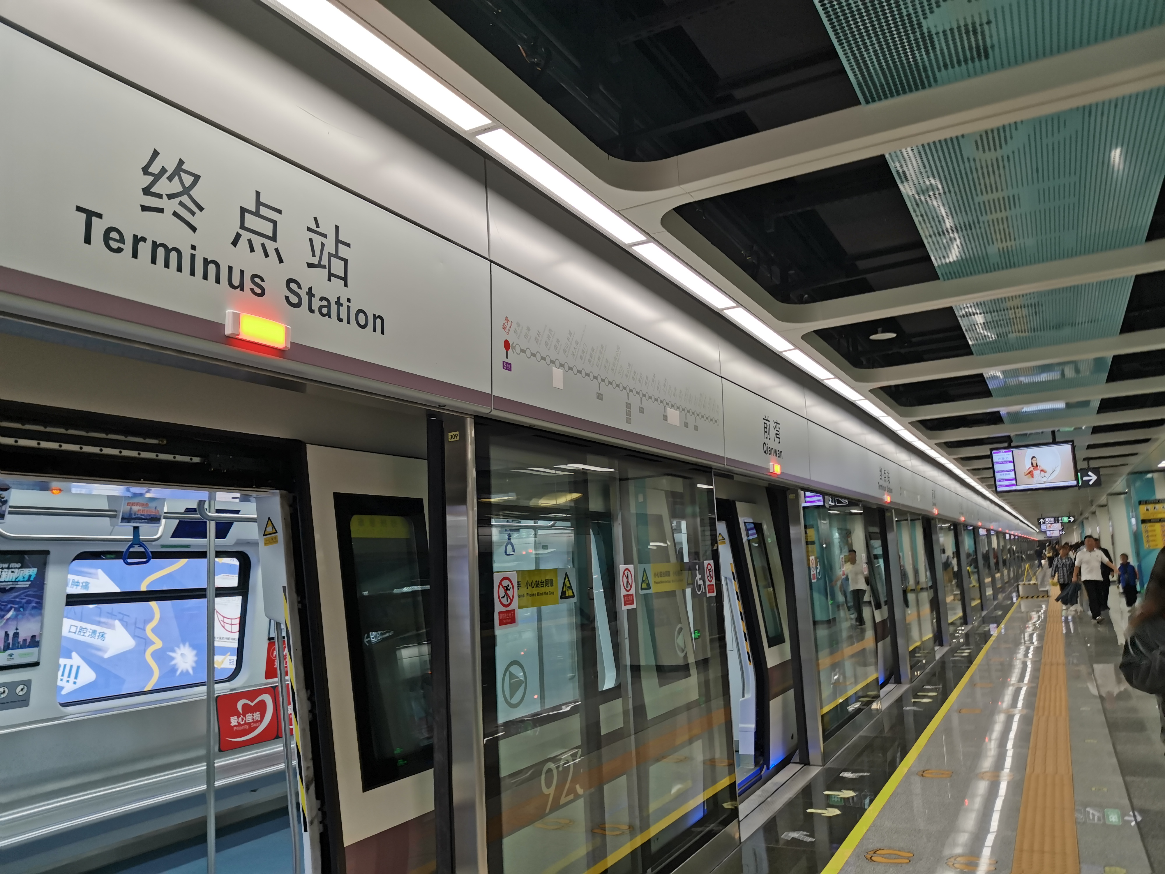 前灣站 9号线终到月台